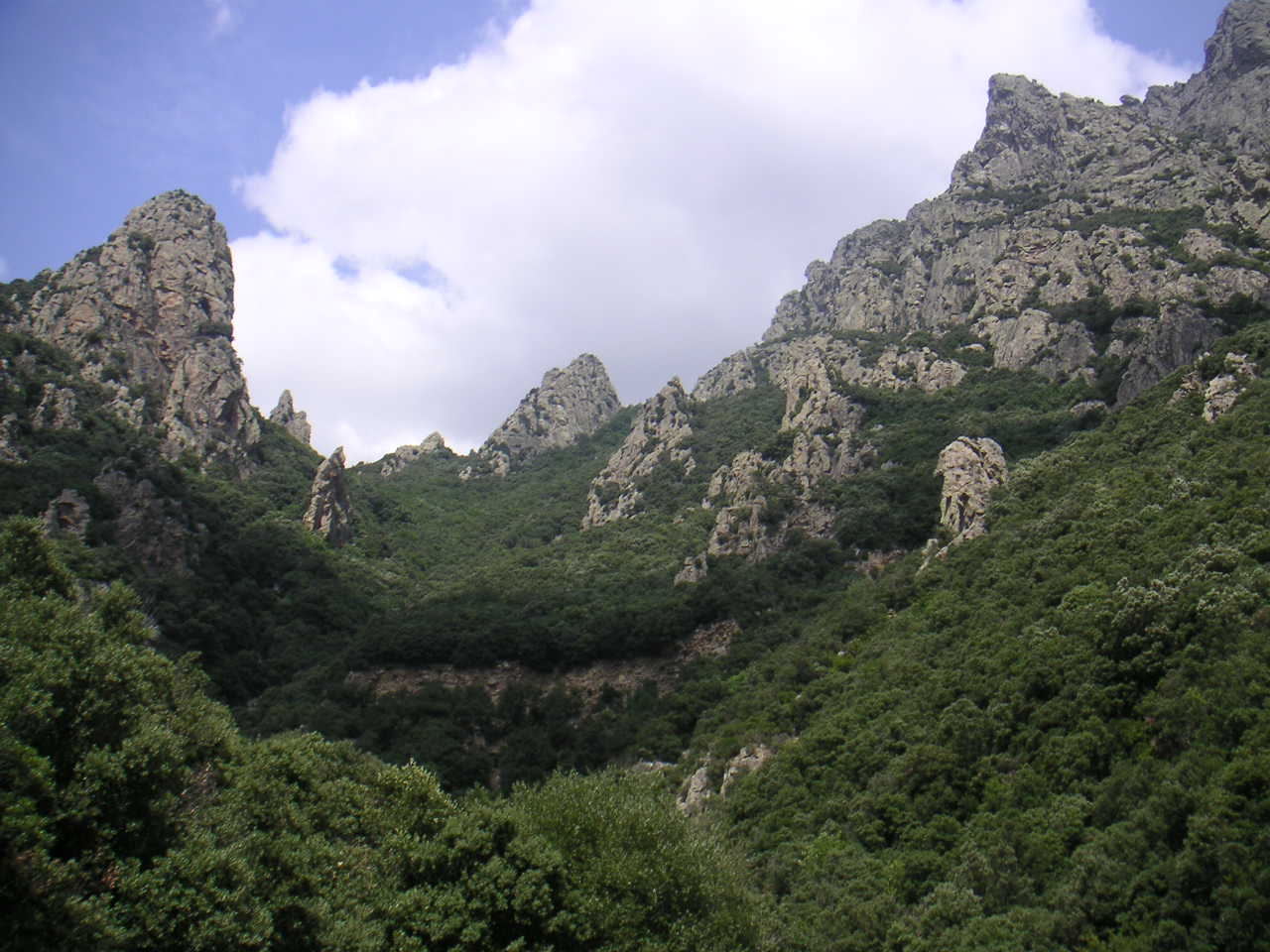 Gorges d'Héric - Les "Minarets" Photo personnelle - TouN Prise en août 2004